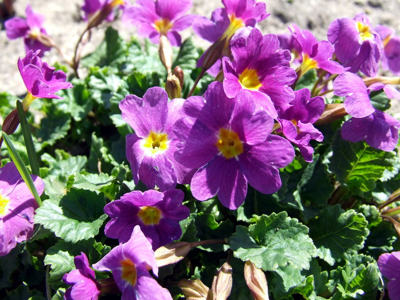 Primula vulgaris. Veseluvka, Jonava district, Lithuania.